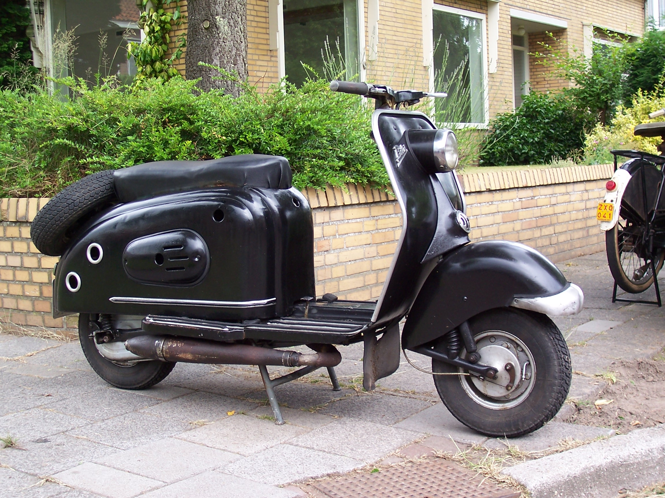 Bitri van Almar Wildschut & Bauke Bos. De laatste Bitri die gemaakt is, kwam in 1973 uit de fabriek in Dokkum